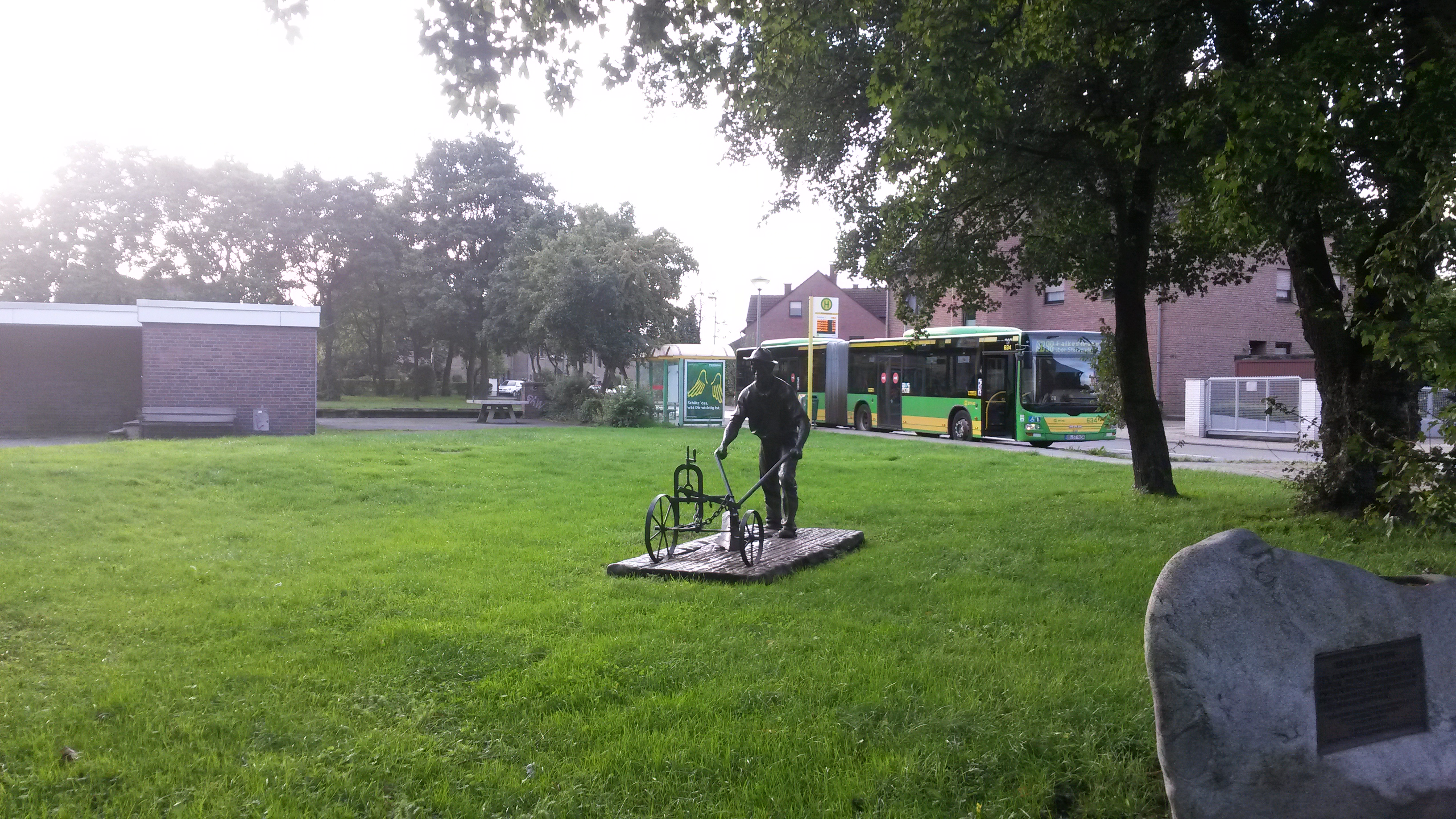 Der Fröbelplatz in Alstaden (Oberhausen)